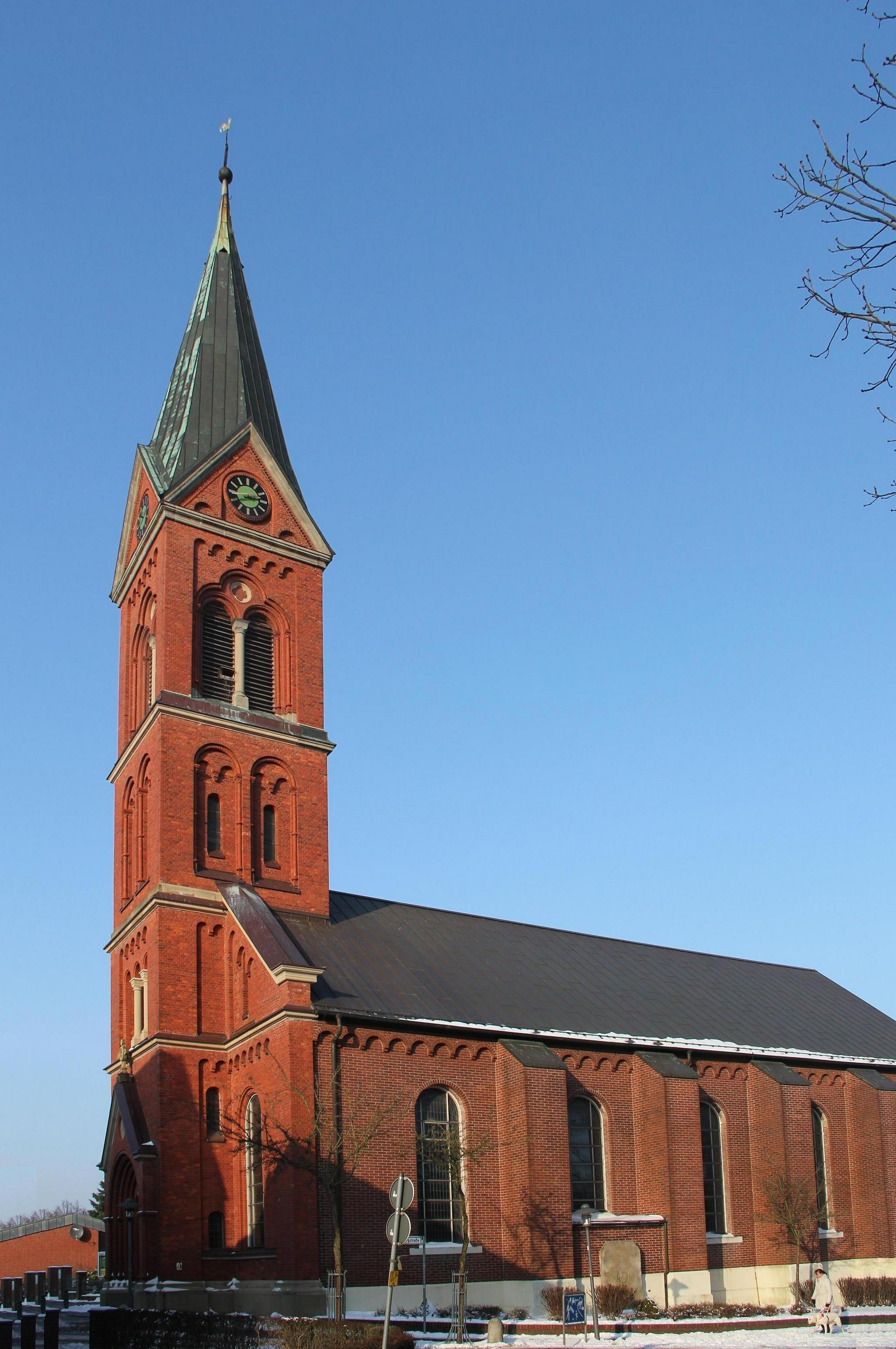 Katholische Kirche St. Peter und Paul in Wildeshausen